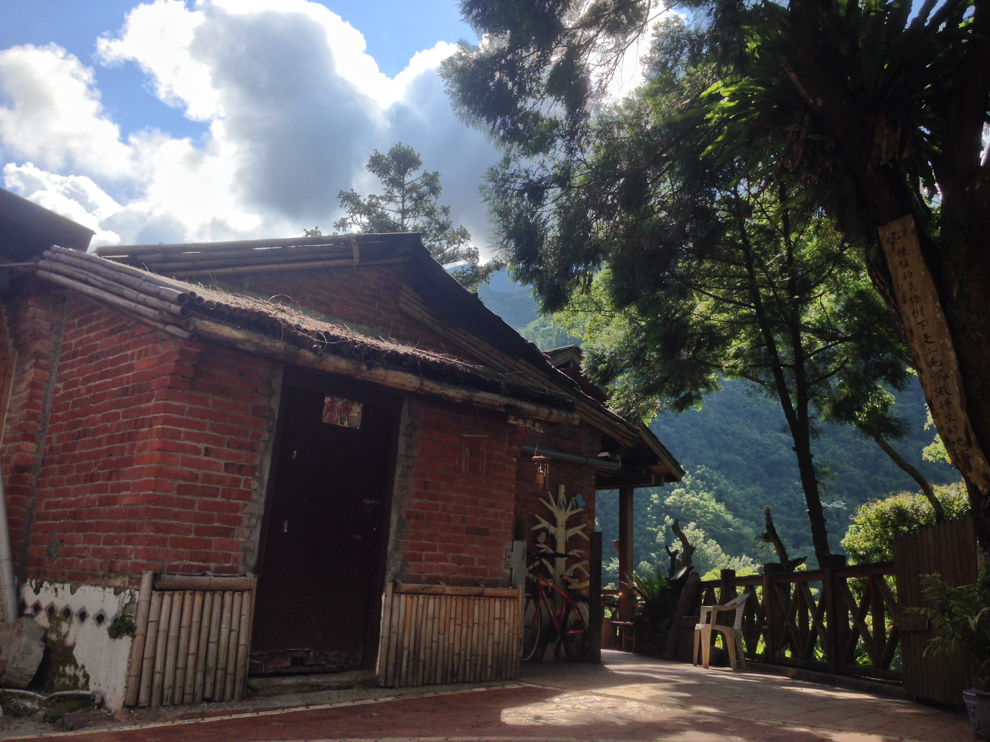 三毛夢屋與三毛所喜的梢楠樹。